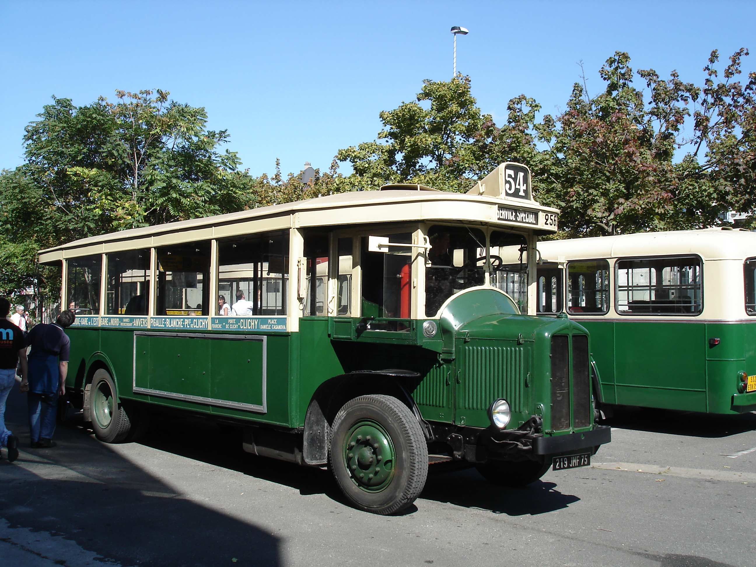 Autobus Renault TN6 A2 datant de 1932Journées du patrimoine AMTUIR 15/09/2007.